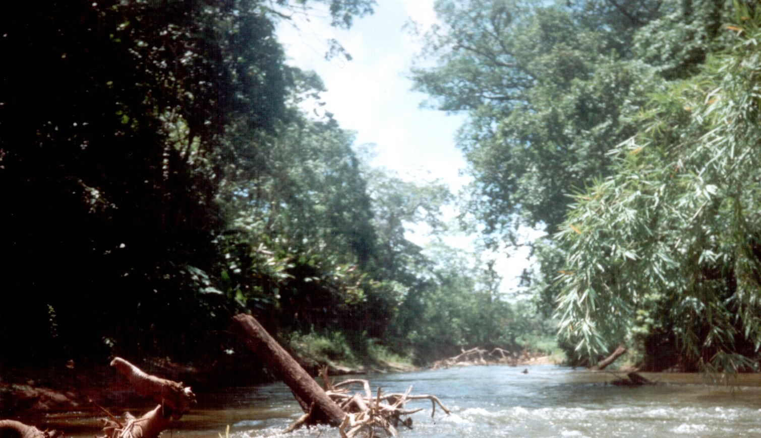 Eigen werk, Rio Platano, juli 1994